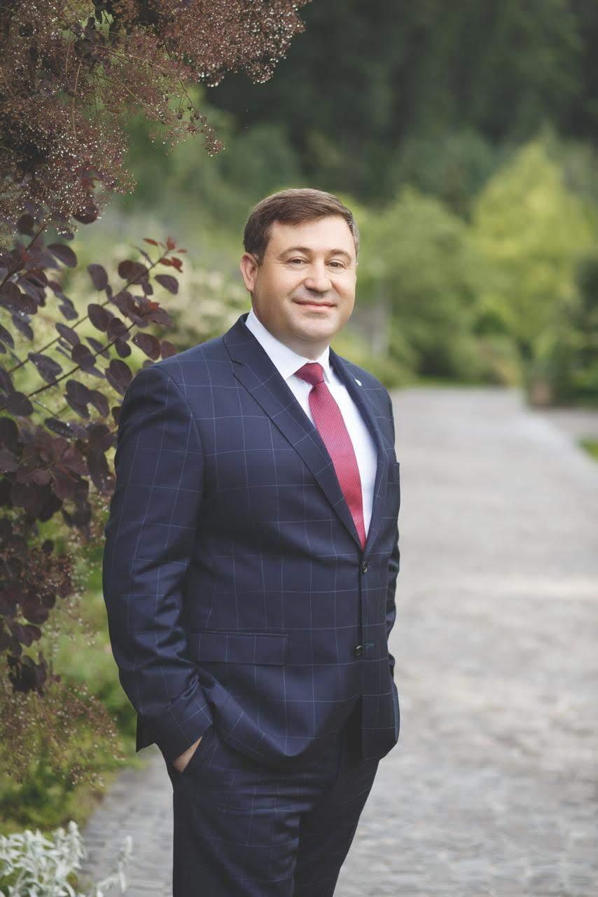 Півень Андрій Васильович, український підприємець та меценат в місті Ужгород.